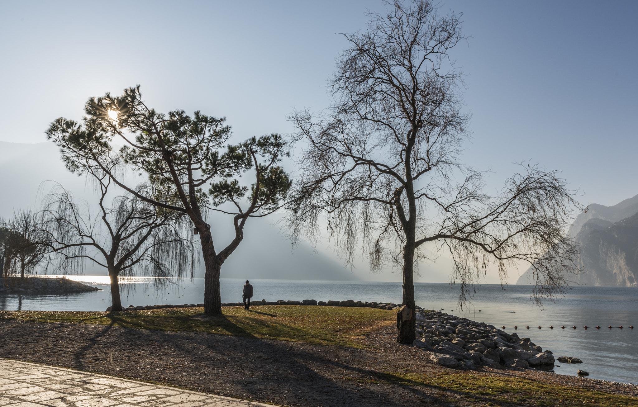 500px provided description: Al Lago